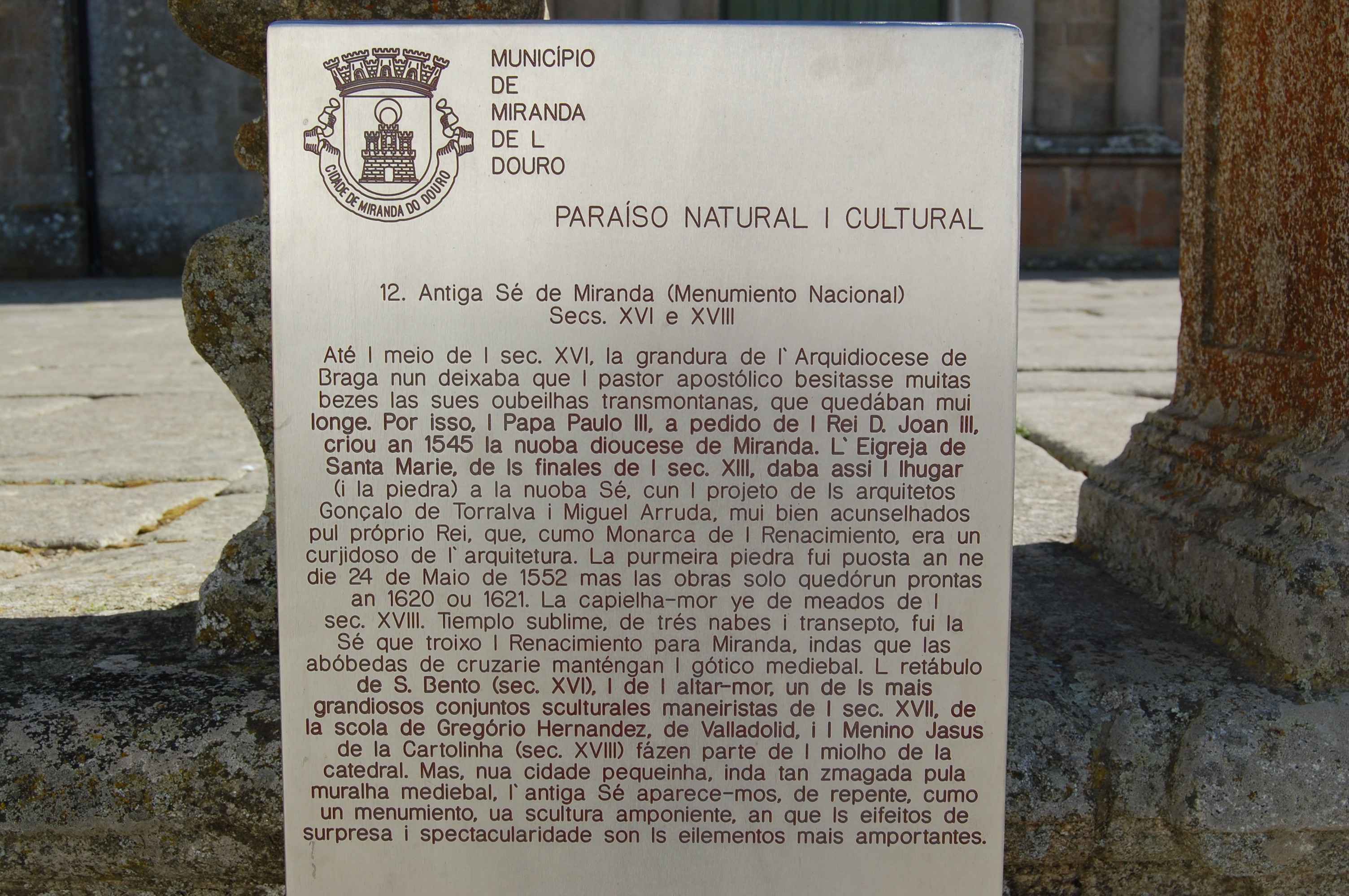 Placa de identificação de monumento em mirandês (Miranda do Douro, Portugal.)